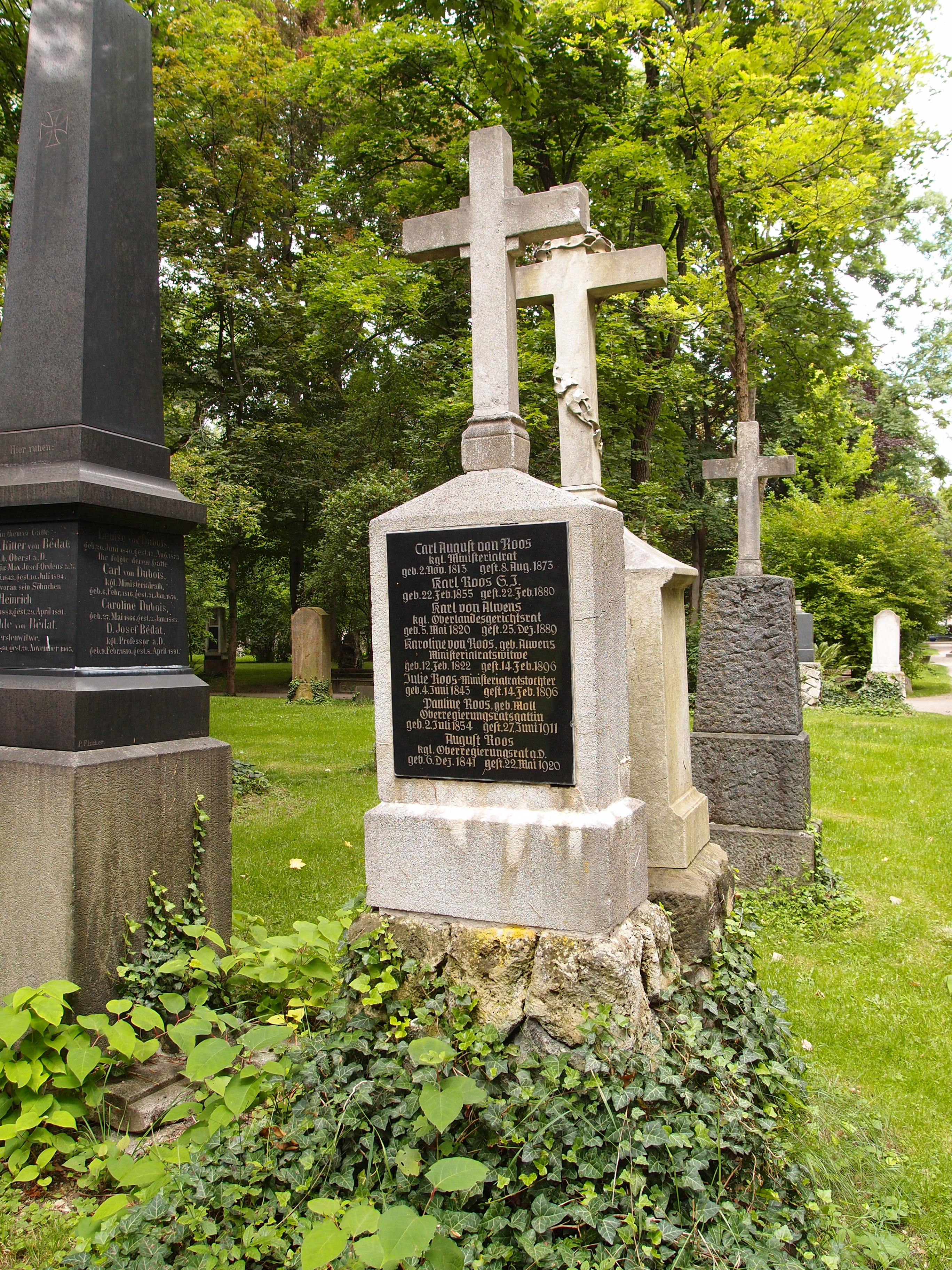 Grab des Juristen und bayerischen Politikers Karl von Alwens (1820-1889) auf dem Alten Nördlichen Friedhof in München.